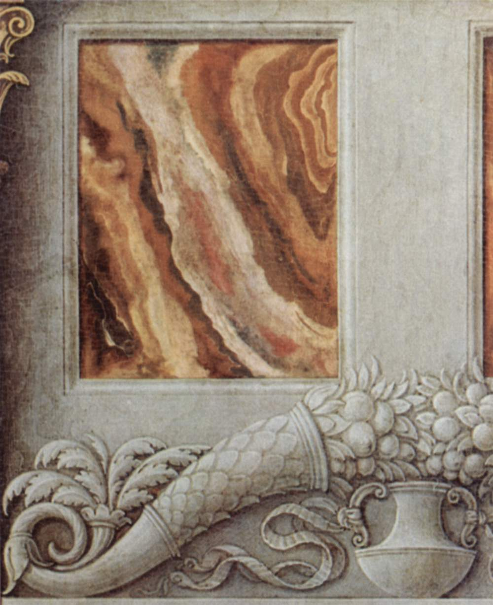 Altarretabel der Palastkapelle des Herzogs von Mantua